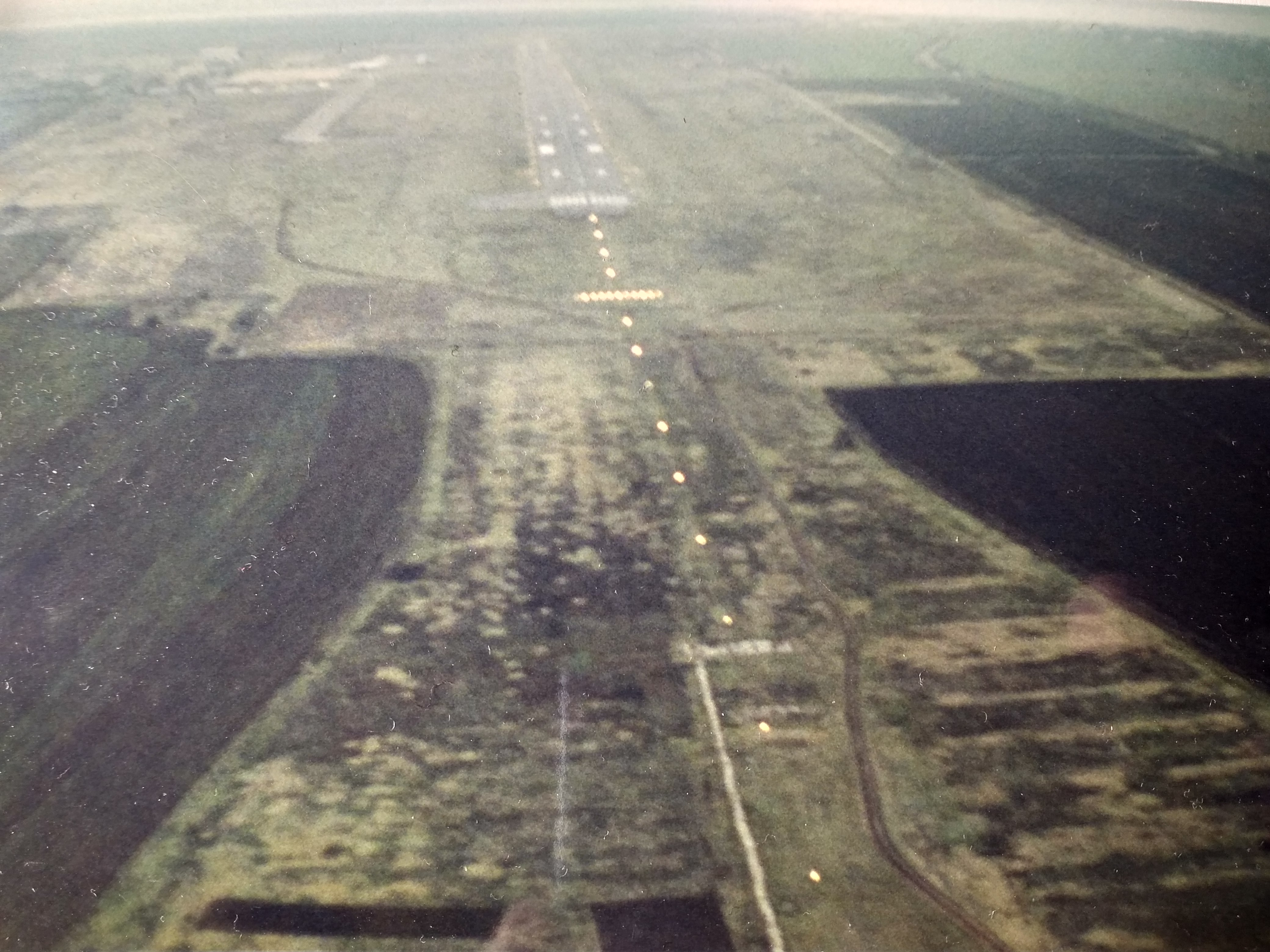 Знято на смартфон Xiaomi Redmi 4 з давнього знімку 1996 року, котрий я зробив з гвинтокрила Ка-26 при обльоті світлосигнальної системи.